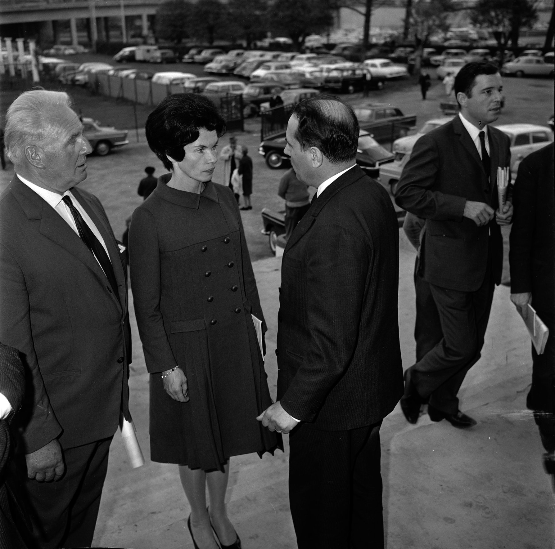 Parking de la salle Jean Mermoz. Le 20 Octobre 1965. Vue de François et de Danielle Mitterand sur les marches de la salle Jean Mermoz.